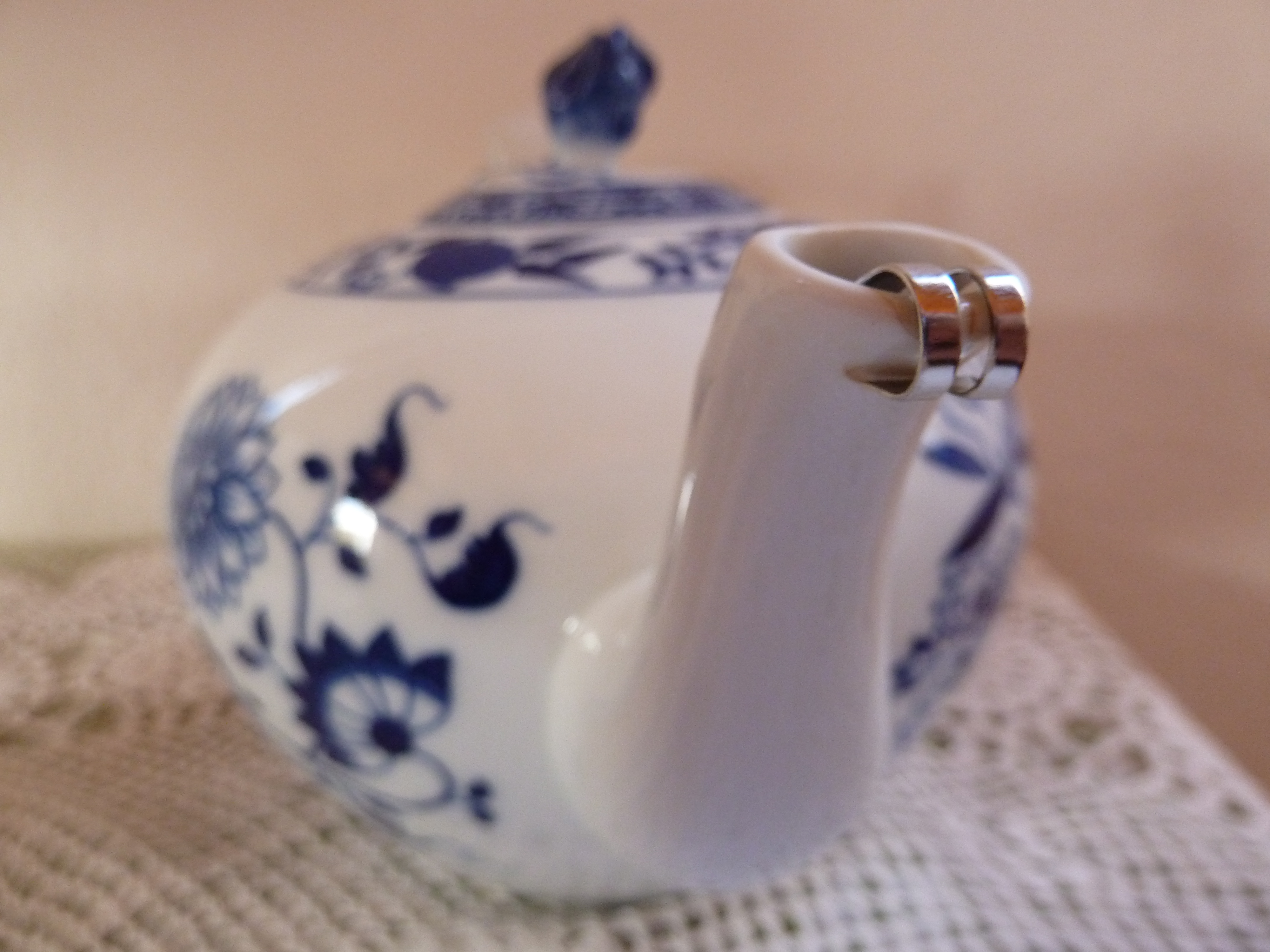 Tropfenfänger aus Metall auf einer Teekanne mit Zwiebelmuster